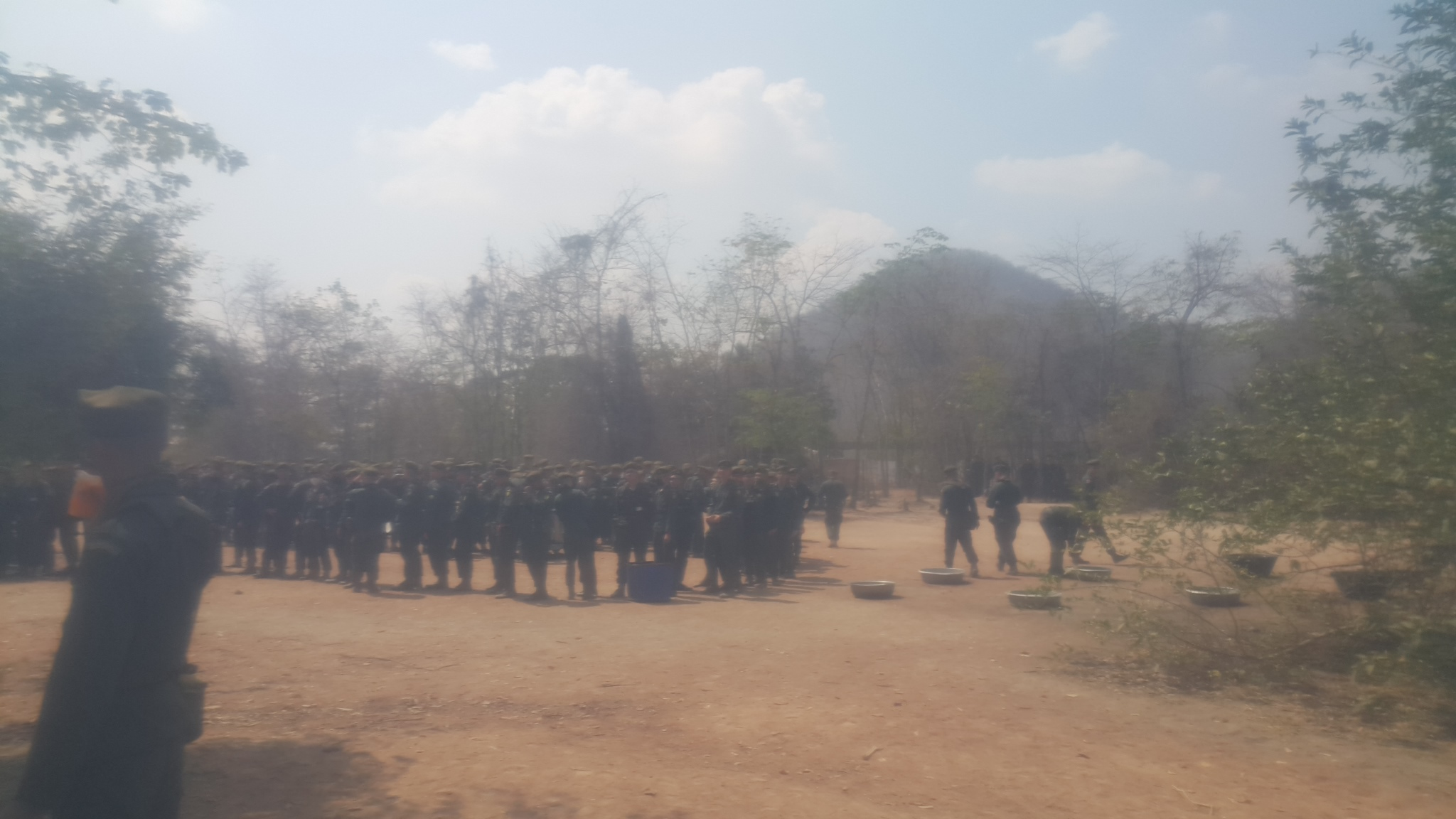 การฝึกภาคสนามที่เขาชนไก่ของ นักศึกษาวิชาทหาร รักษาดินแดน ชั้นปีที่ 3 ภาพนี้ถ่ายในการฝึกเดือนกุมภาพันธ์ 2019 ผลัดที่ 30